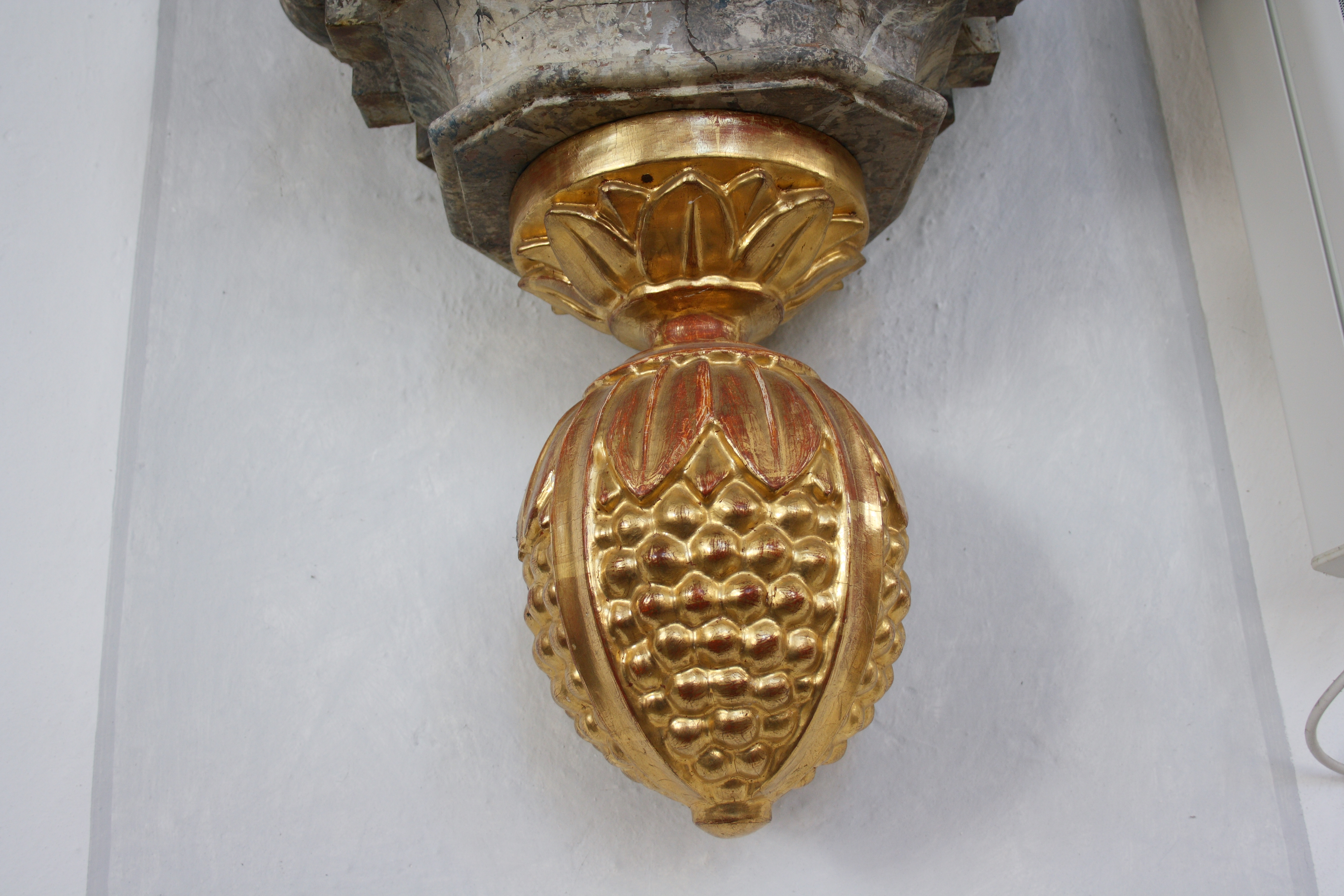 Katholische Pfarrkirche St. Ulrich und Martin in Wittislingen im Landkreis Dillingen an der Donau, Zirbelnuss, unterer Abschluss der Kanzel von Johann Bayer und Joseph Mayerhofen von 1761, um 1800 verändert